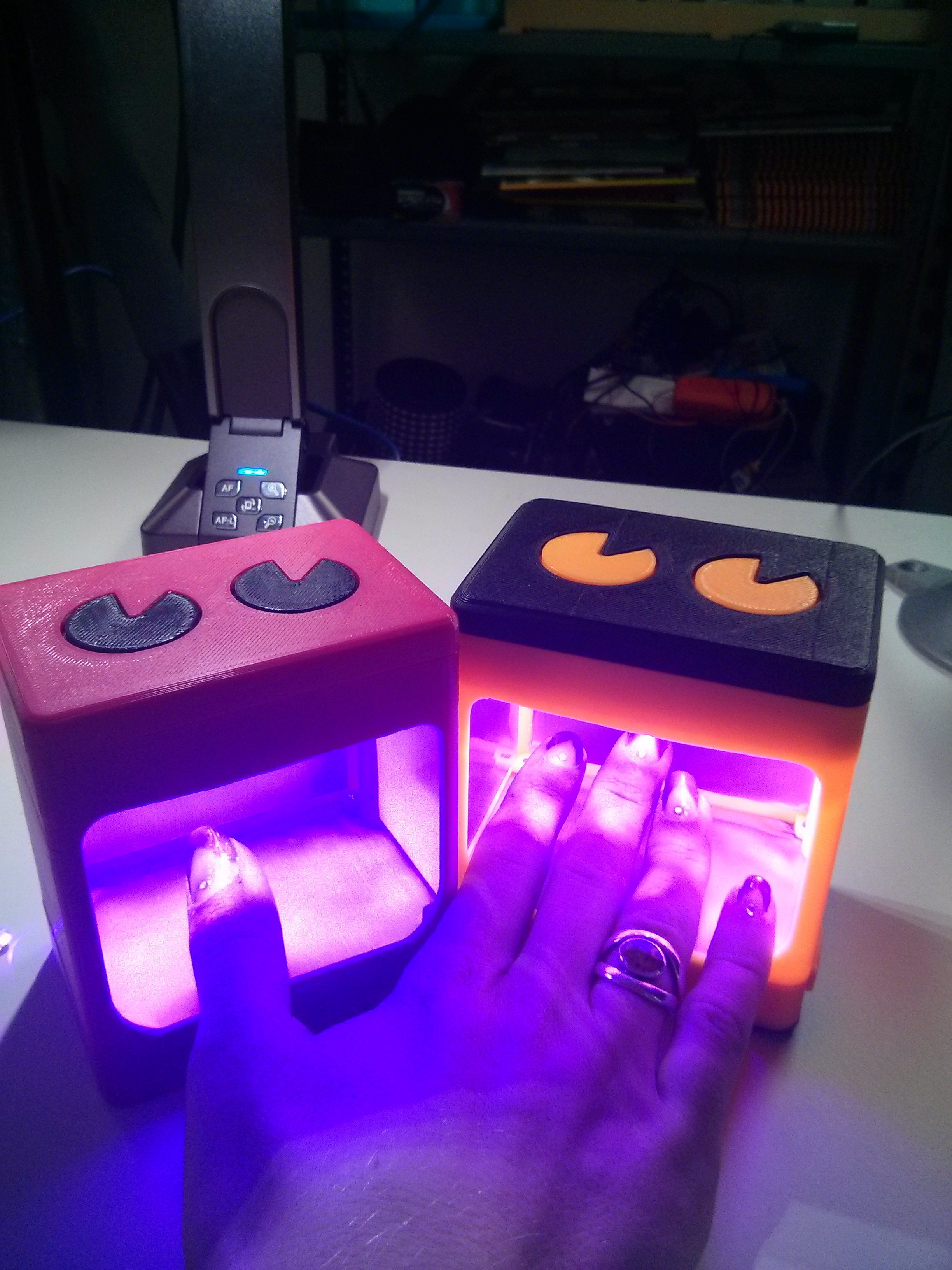 UV manicure lamps